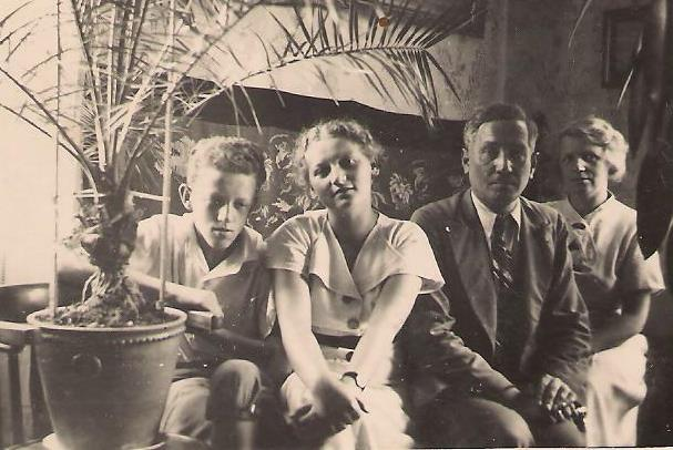 Burmistrz Franciszek Tatkowski z rodziną.